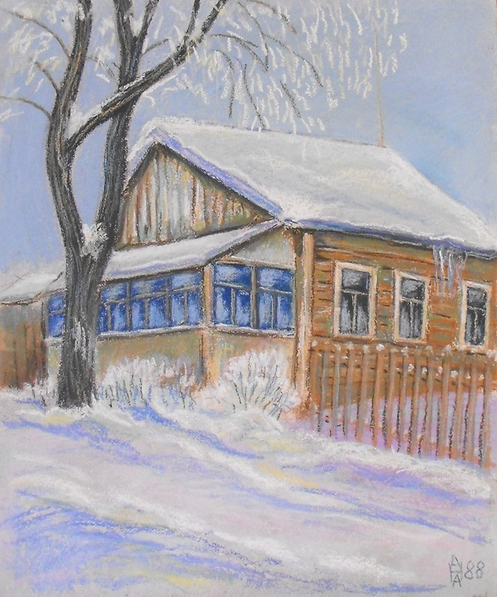 Любавичи, 1988 год. "Дом цадиков". Место жизни раввина Шнеерсона. Написано в 1988 году. Пастель. ДВП. Художник - Анатолий Наливаев.